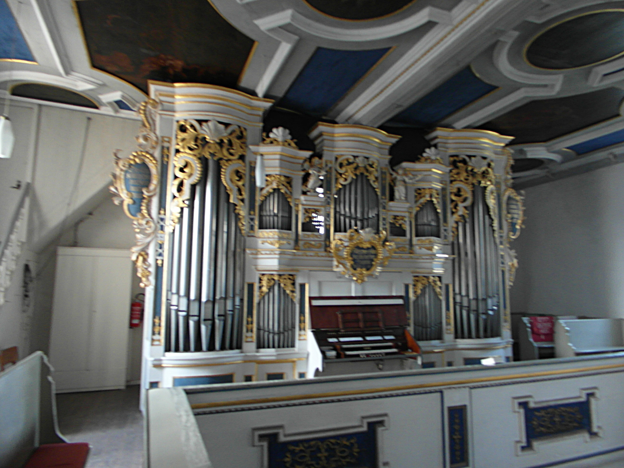 Orgel der Christophoruskirche in Saara (1911-1912) von Heinrich Hegermann (Altenburg), II/P 24 [1]